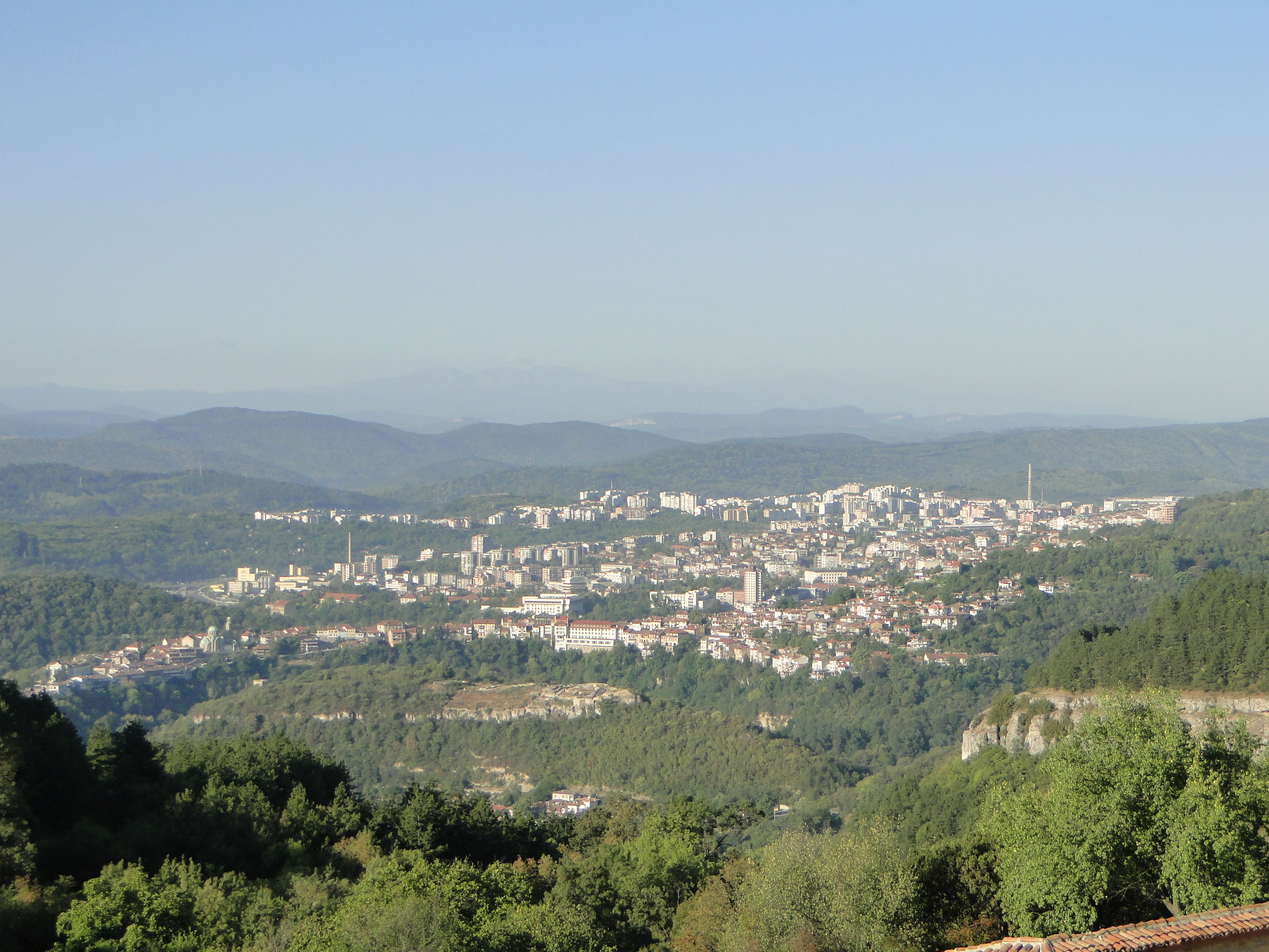 Bulgaria Арбанаси 2012